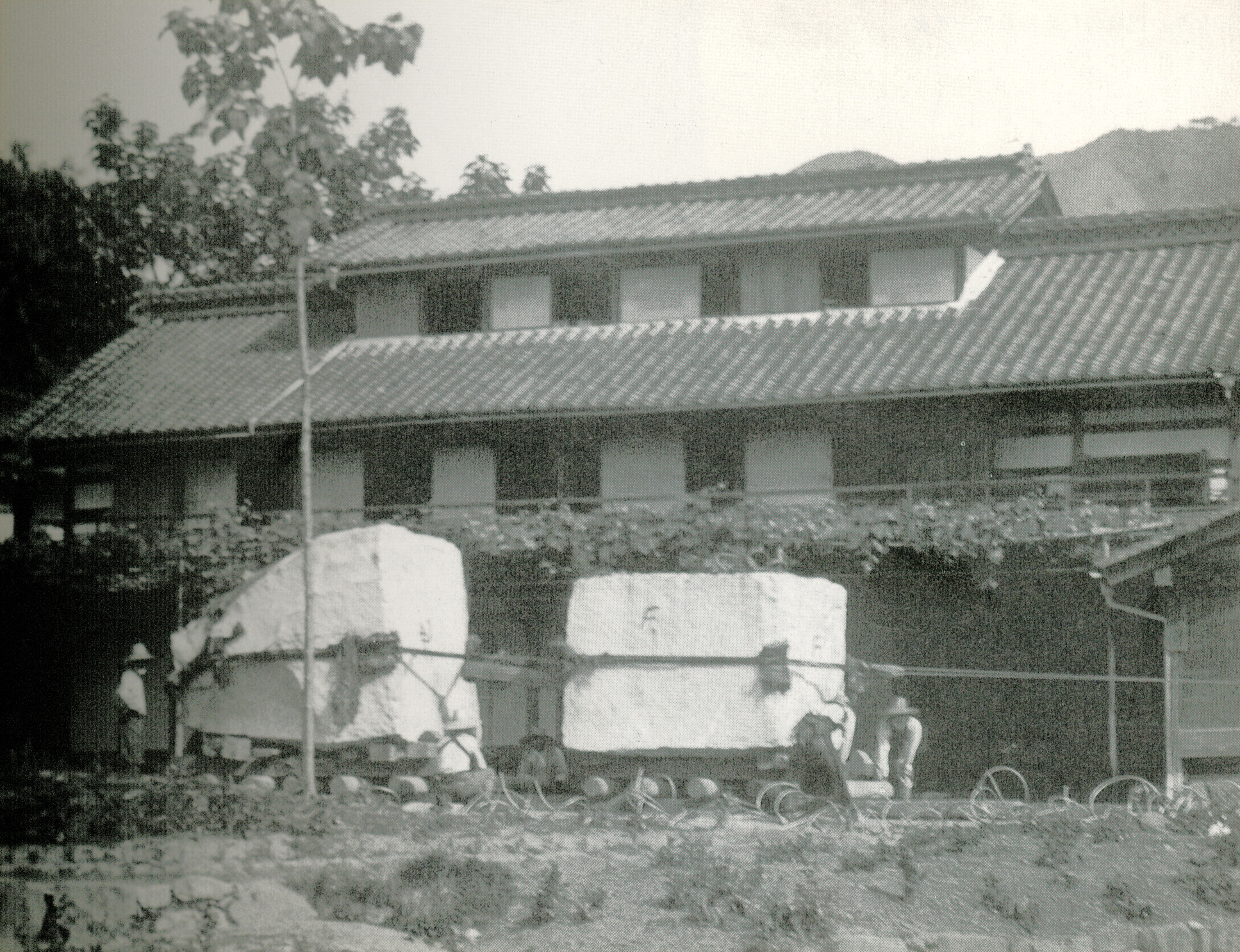 山梨県を襲った水害に対して、恩賜林が下賜された。それに対する謝恩碑（甲府城址）建設が行われた。写真左の参画石材は碑の先端部。